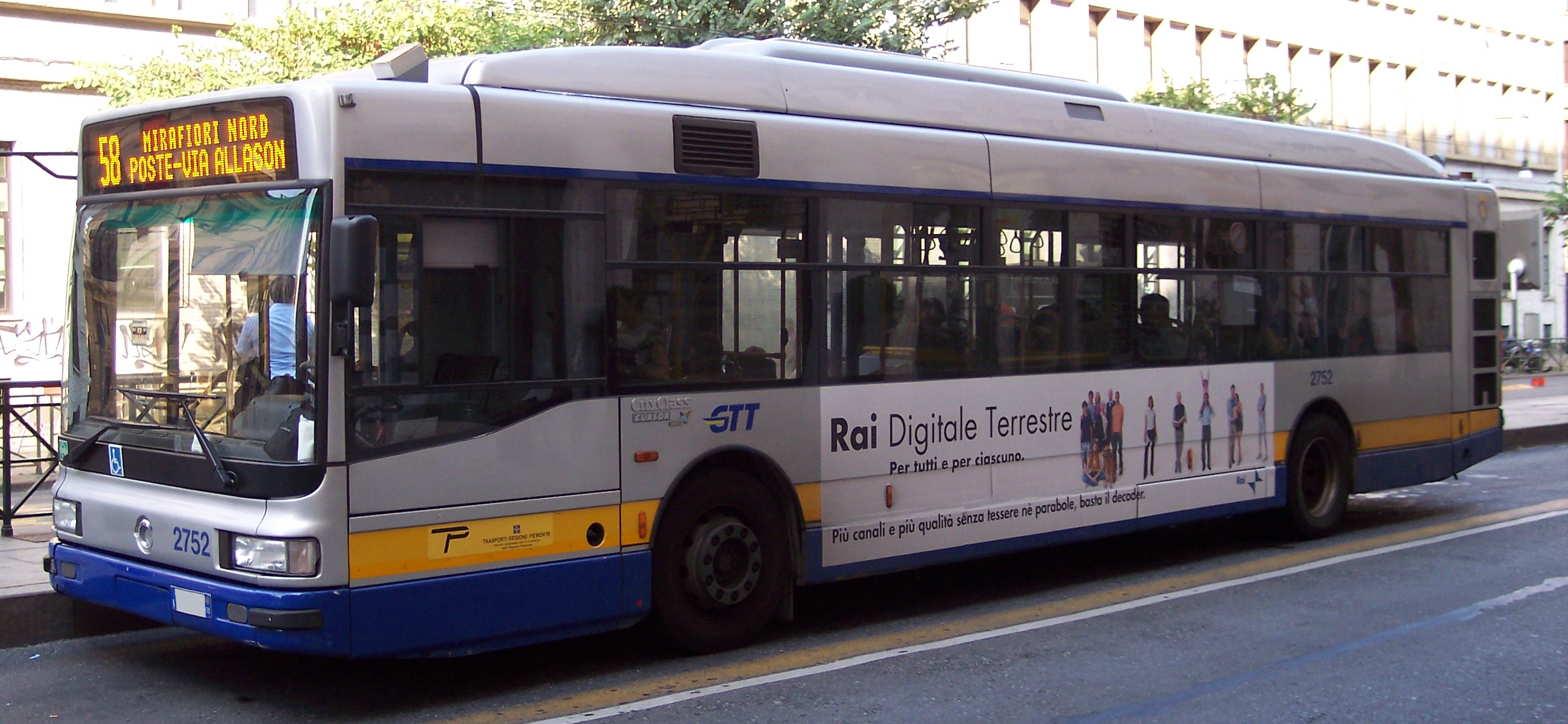 Un autobus Iveco Irisbus CityClass, matricola n. 2752, della società di trasporti torinese GTT. Linea 58, in sosta al capolinea di via Bertola, in centro città.